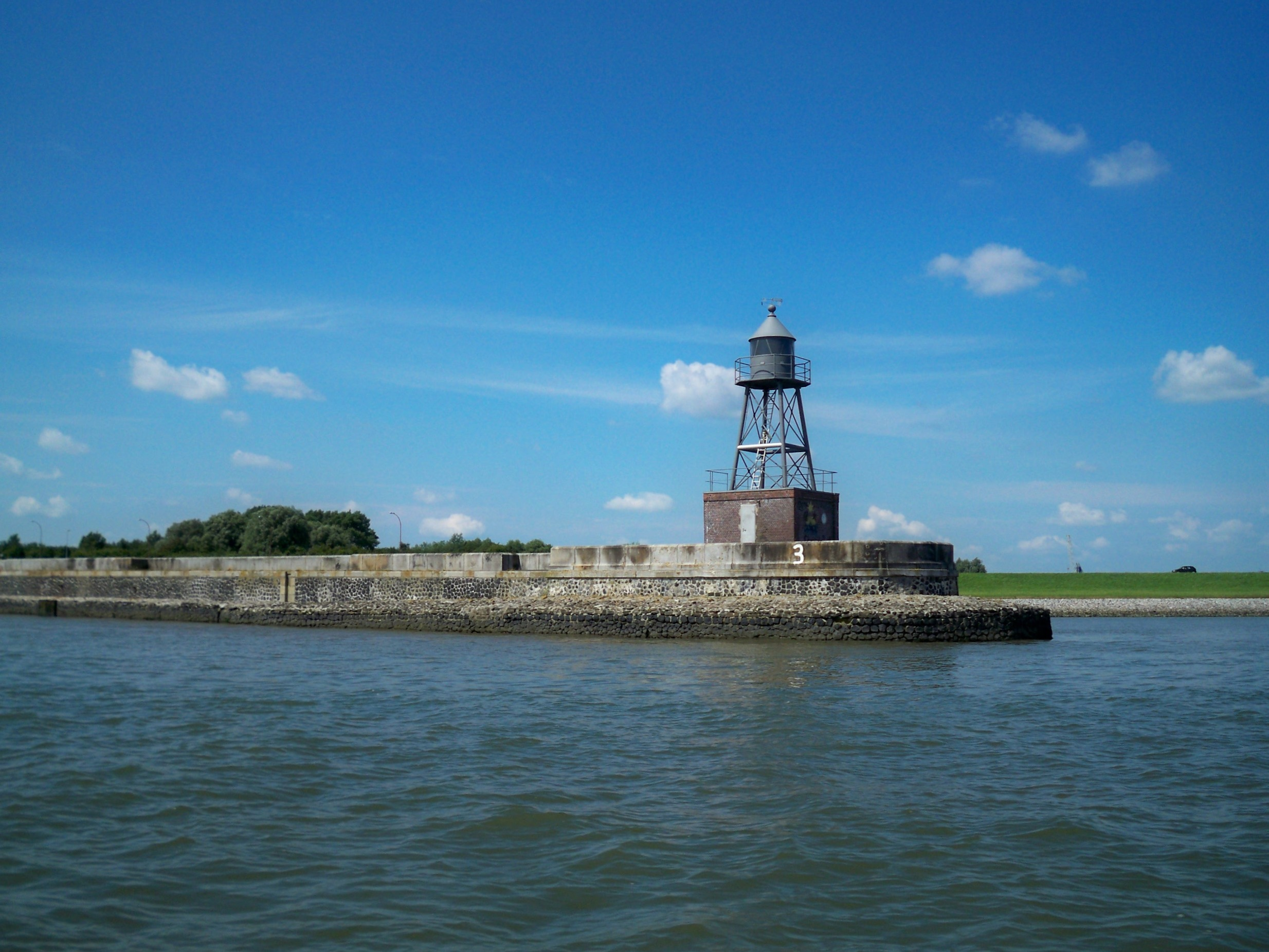 Verloschenes Molenfeuer der ehemaligen III. Einfahrt zu den Wilhelmshavener Häfen